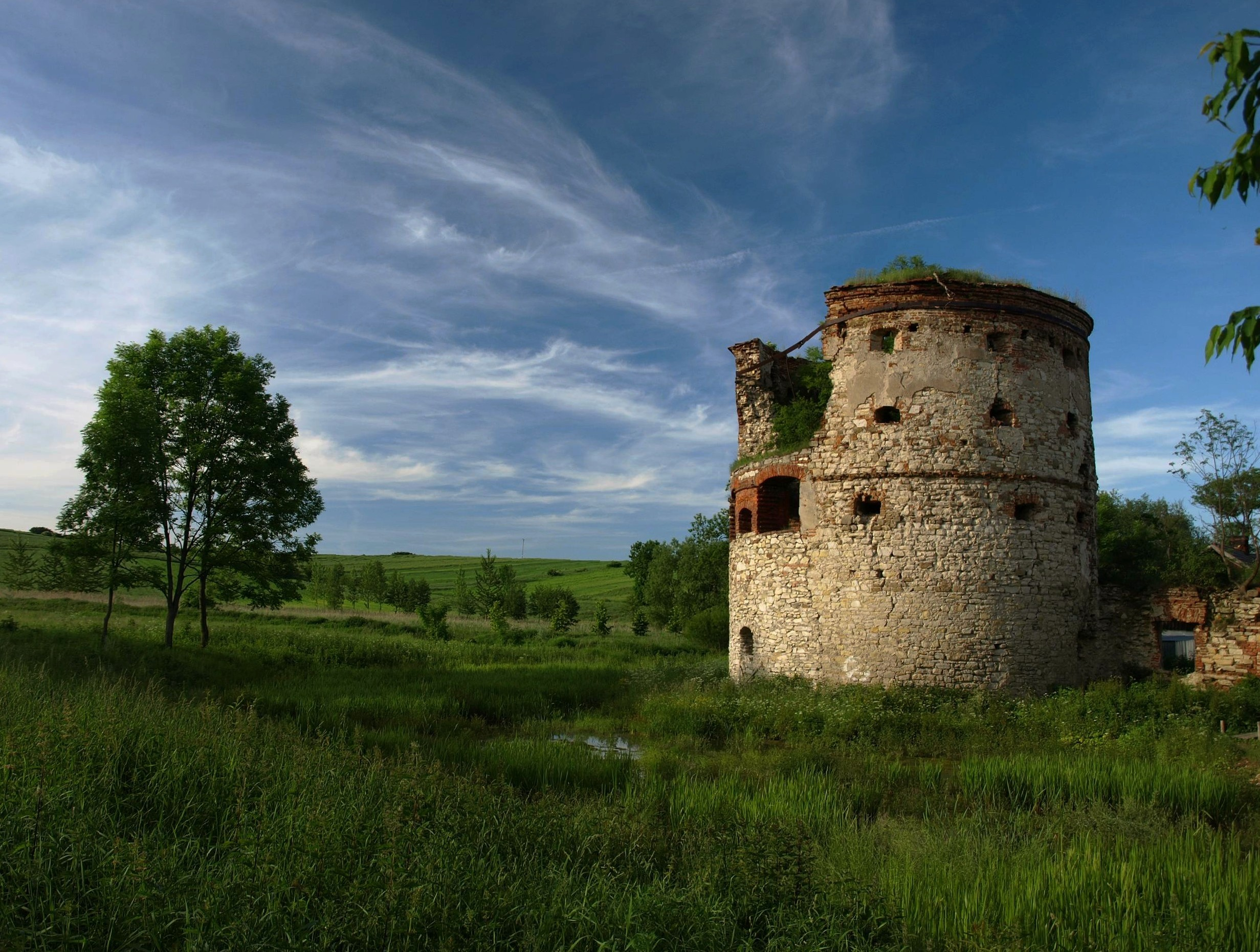 pozostałości zamku w Węgierce (woj. podkarpackie).